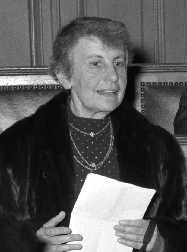 Herdenking geboortedag Prof. Sigmund Freud. Dochter Anna Freud (l.) met dr. Maria C. MacKenzie-van der Noorda